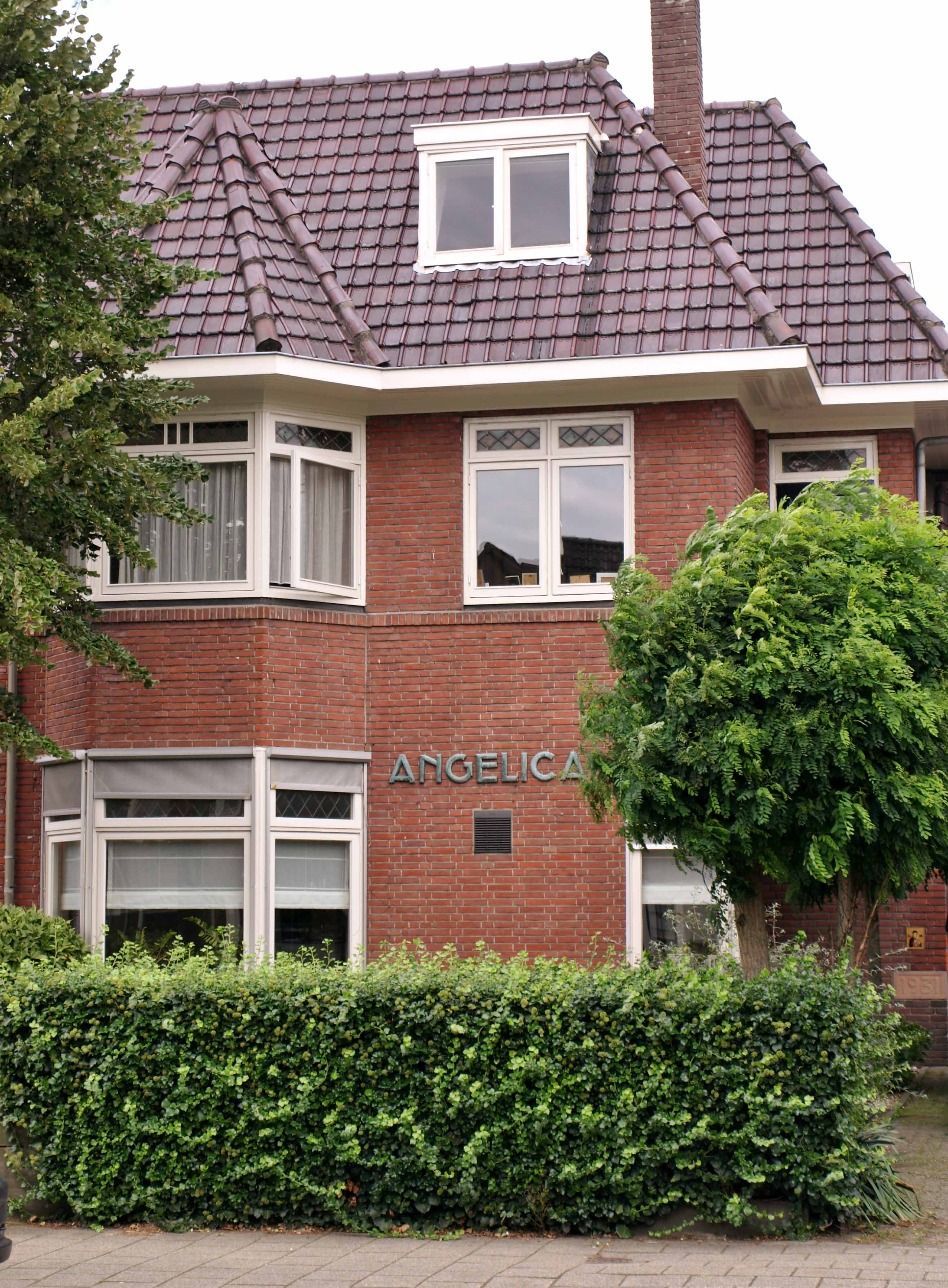 huize Angelica, architect Ide Bloem